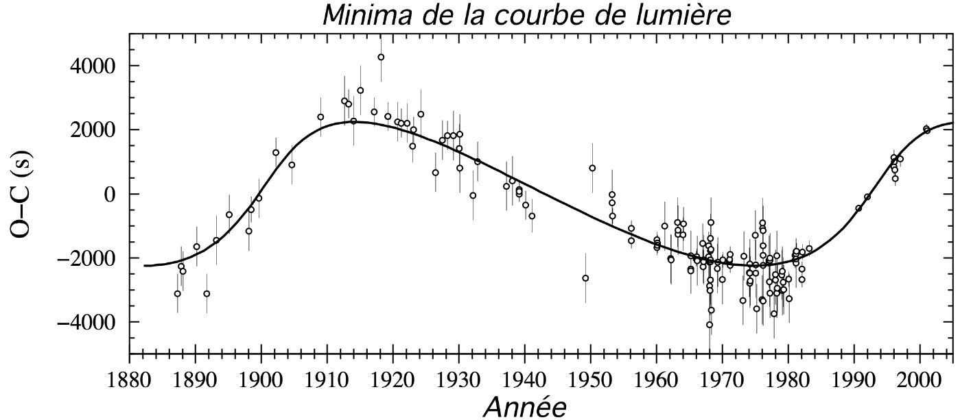 temps de trajet de lumière sur R Canis Majoris - light-travel time on eclipsing binary